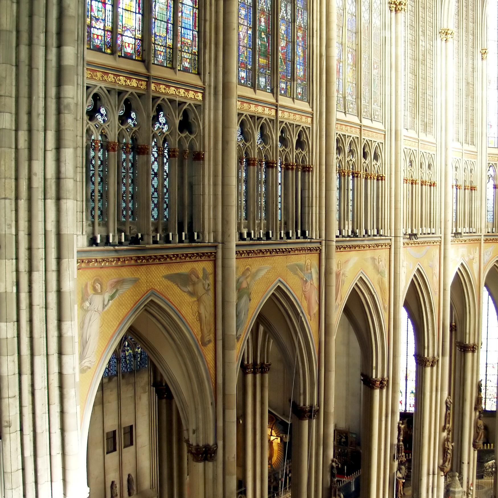 Kölner Dom - Blick vom südlichen Obergaden in den Obergaden des nördlichen Chorraumes